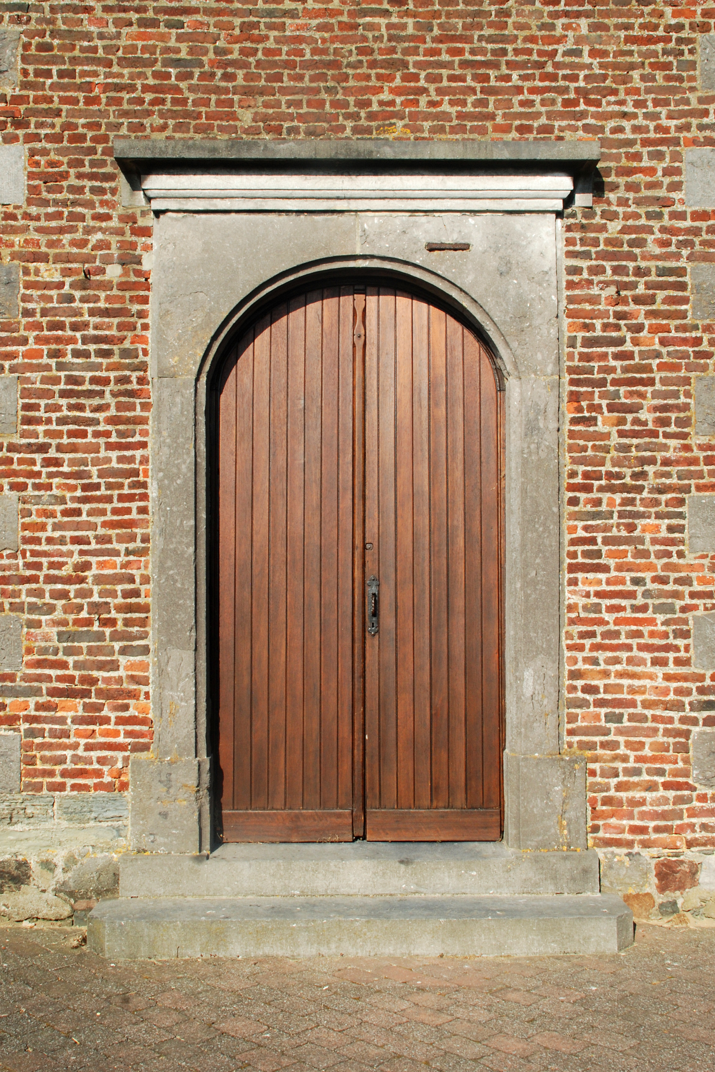 Belgique - Brabant wallon - Chastre - Cortil-Noirmont - Église Saint-Pierre de Noirmont